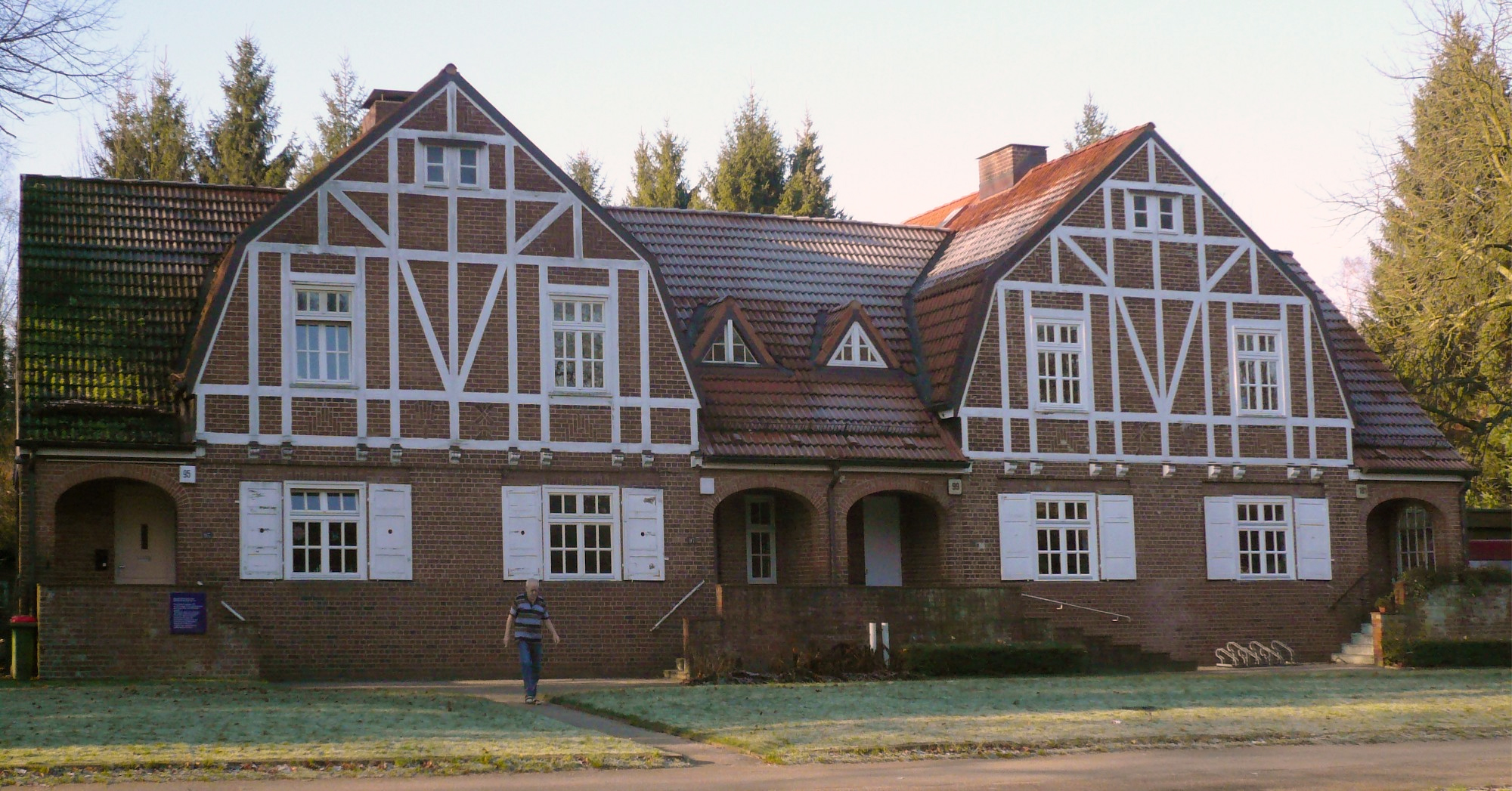 Beamtenhäuser an der August-Krogmann-Straße (Baujahr 1910)